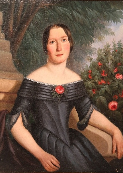 Portret B z pary portretów